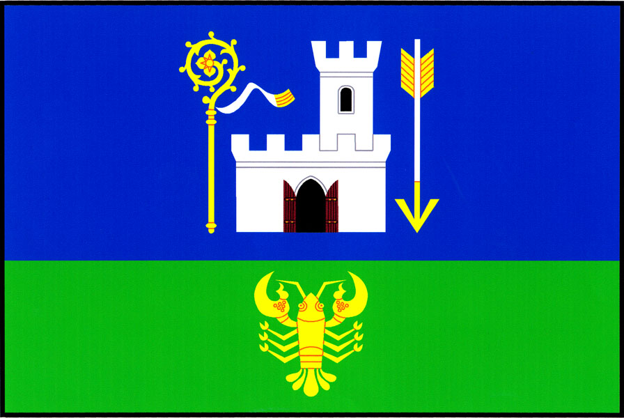 Vlajka obce Újezd u Tišnova